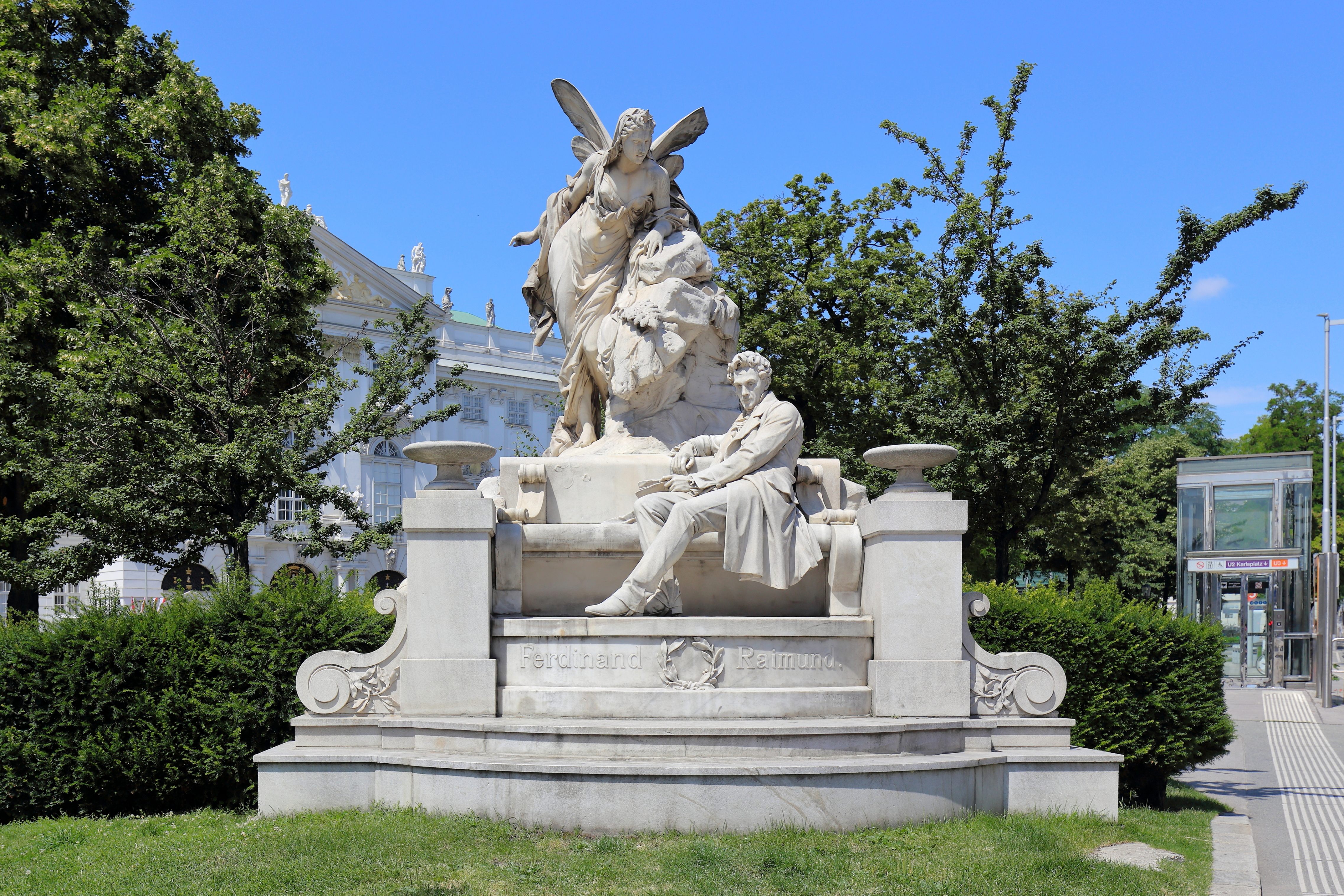 Das Raimund-Denkmal im Weghuber-Park und neben dem Volkstheater im 7. Wiener Gemeindebezirk Neubau.Das Denkmal, ein Werk von dem Bildhauer Franz Vogl, wurde vom Ferdinand-Raimund-Denkmalkomitee gestiftet und am 1. Juni 1898 vor dem Volkstheater enthüllt. 1938 erfolgte die Versetzung in den Weghuber-Park.